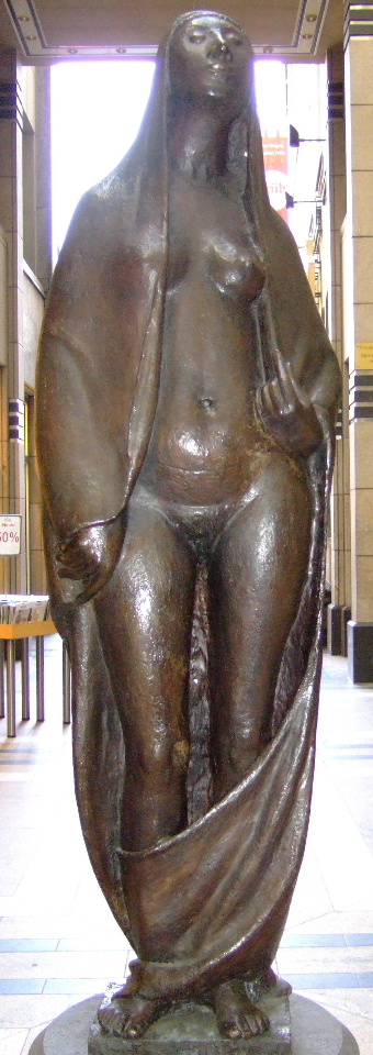 Gerhard Marcks: Gaea II (1965) - Köln - Stollwerk Passage